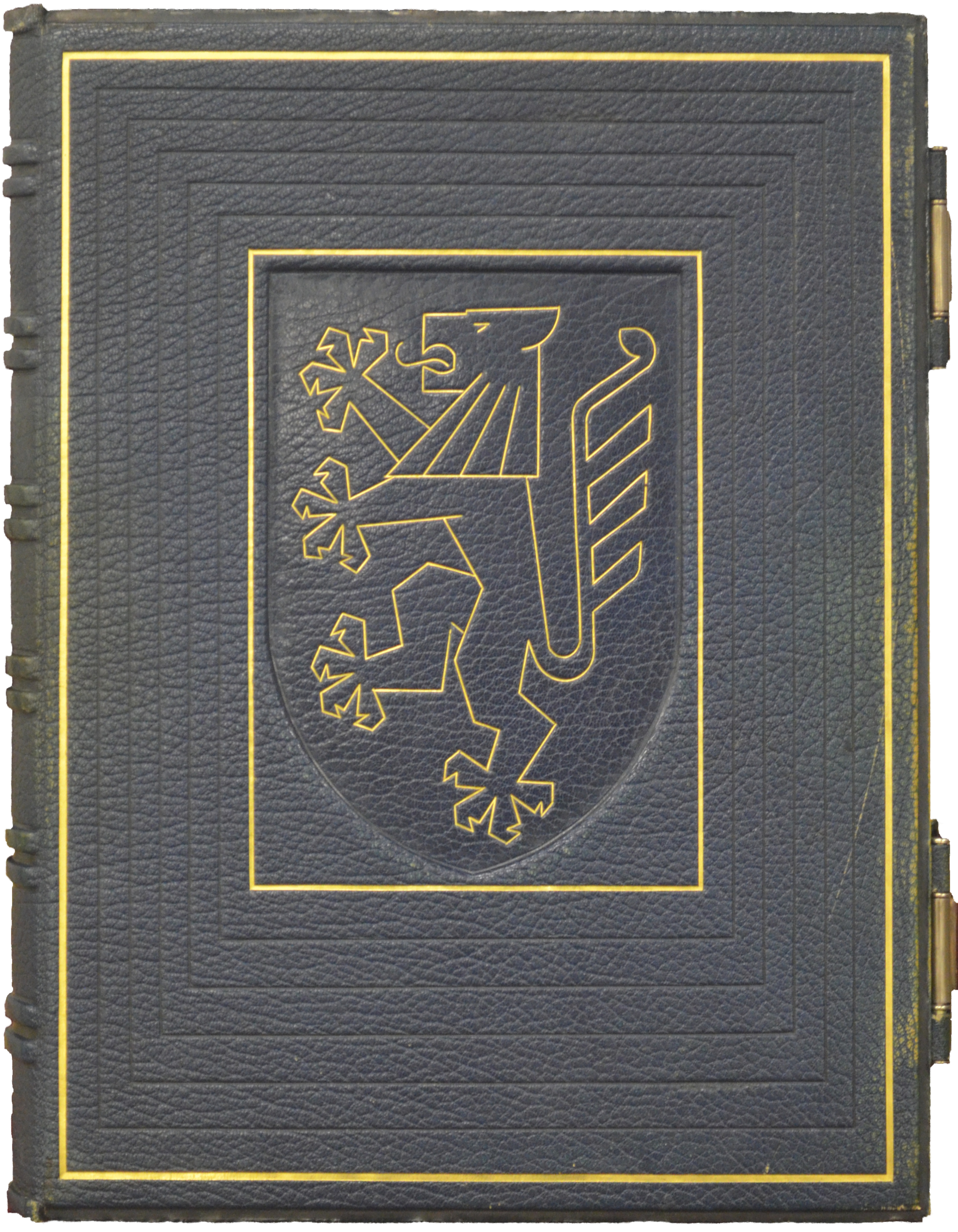 Braunschweig: Einbanddeckel 2. Goldenes Buch der Stadt Braunschweig, geführt von 1951 bis 1995